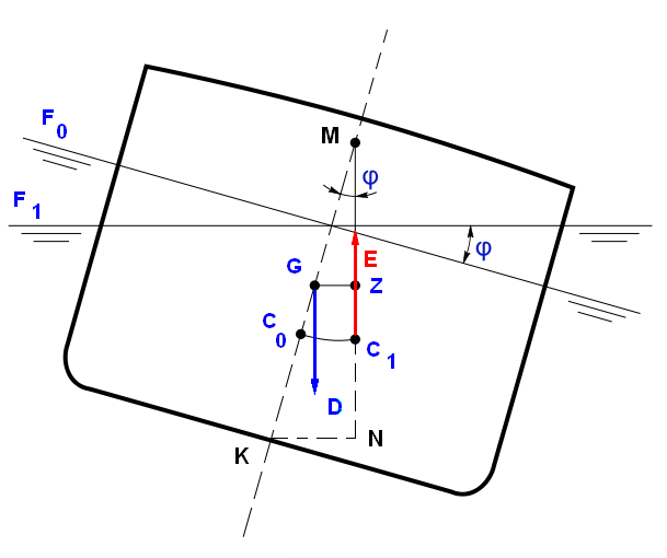 Esquema de estabilidad trasversal (spanish)